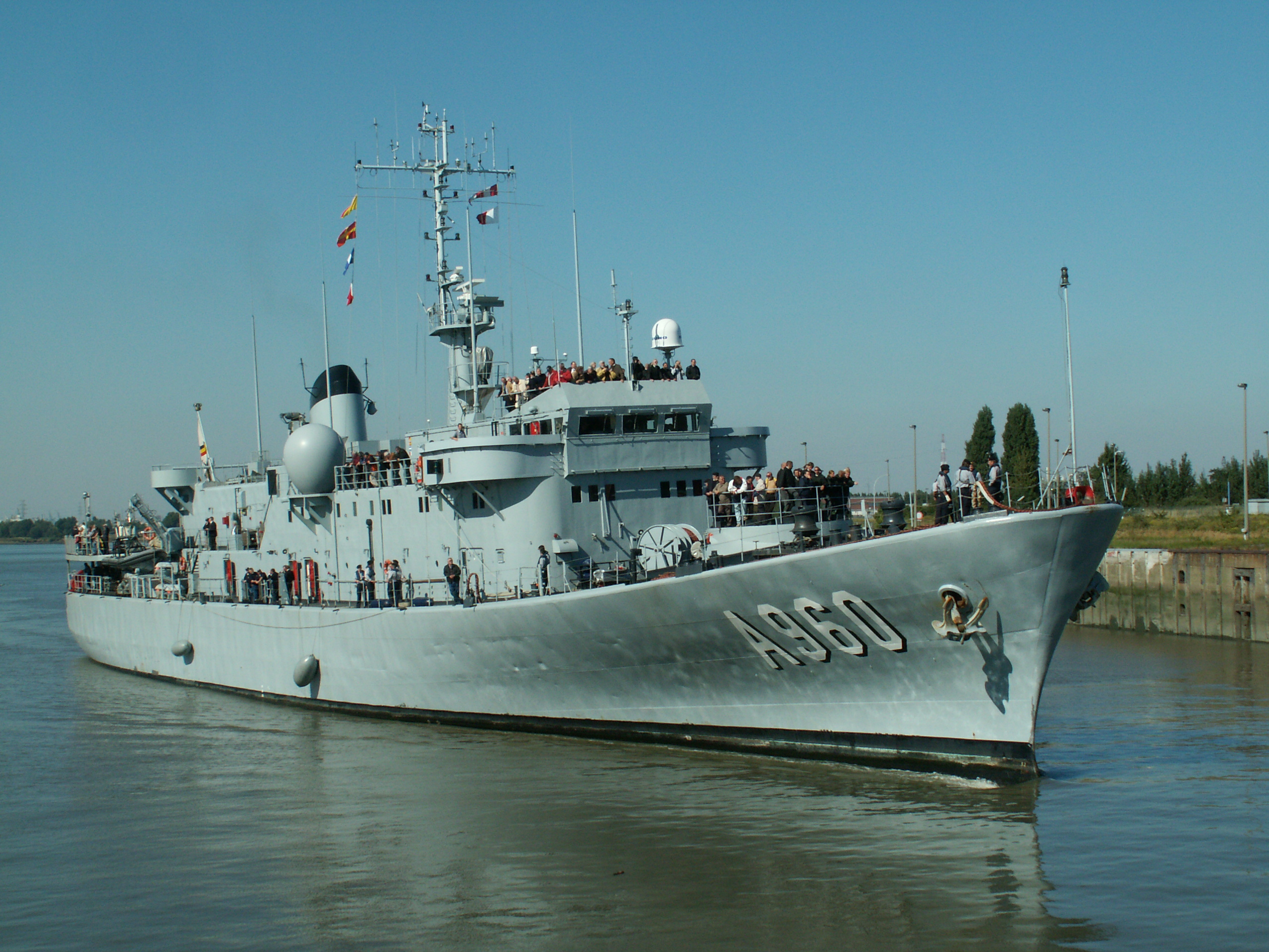 Godetia (A960)